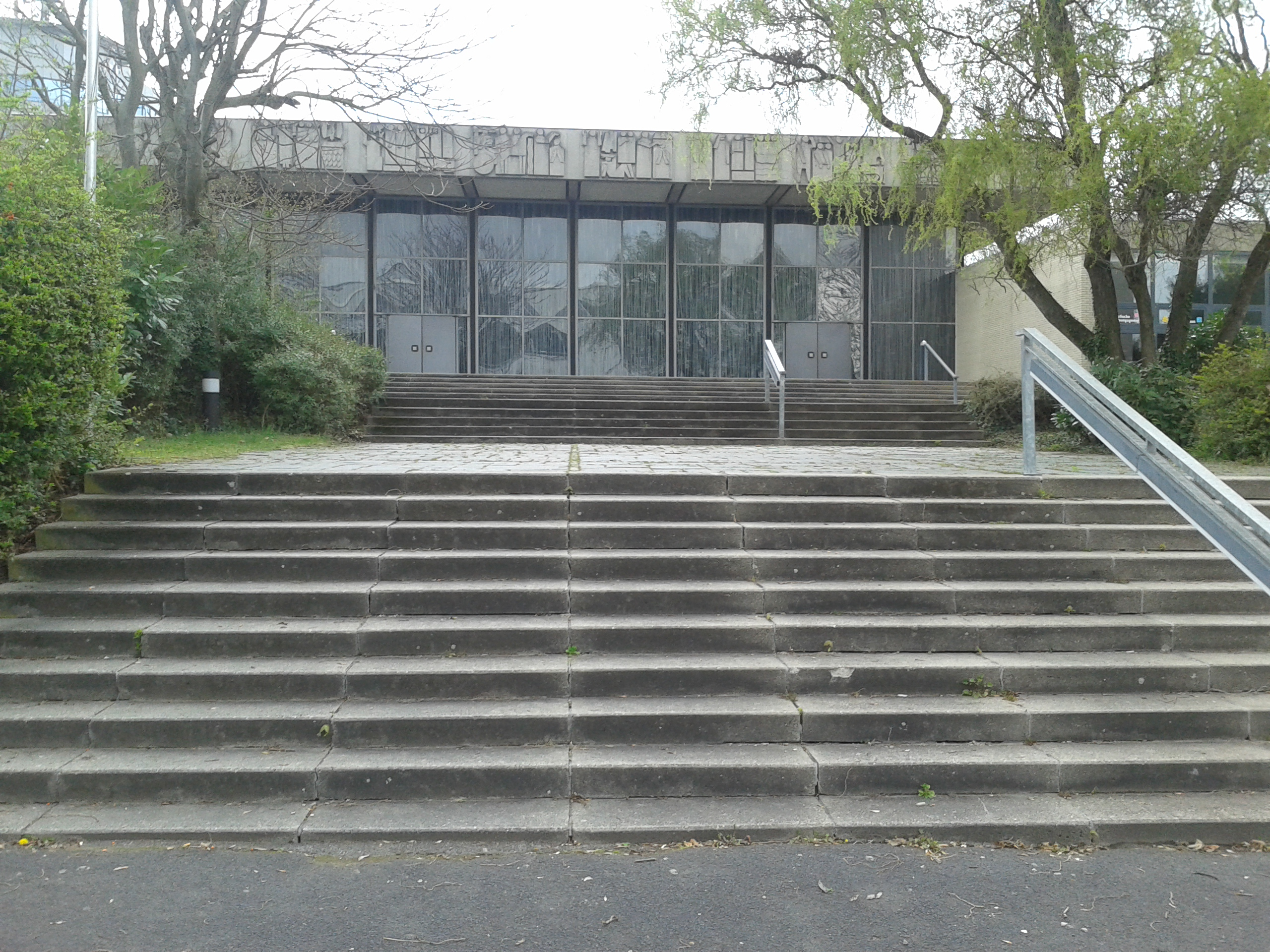 Baudenkmal Am Fort Gonsenheim 151 Mainz